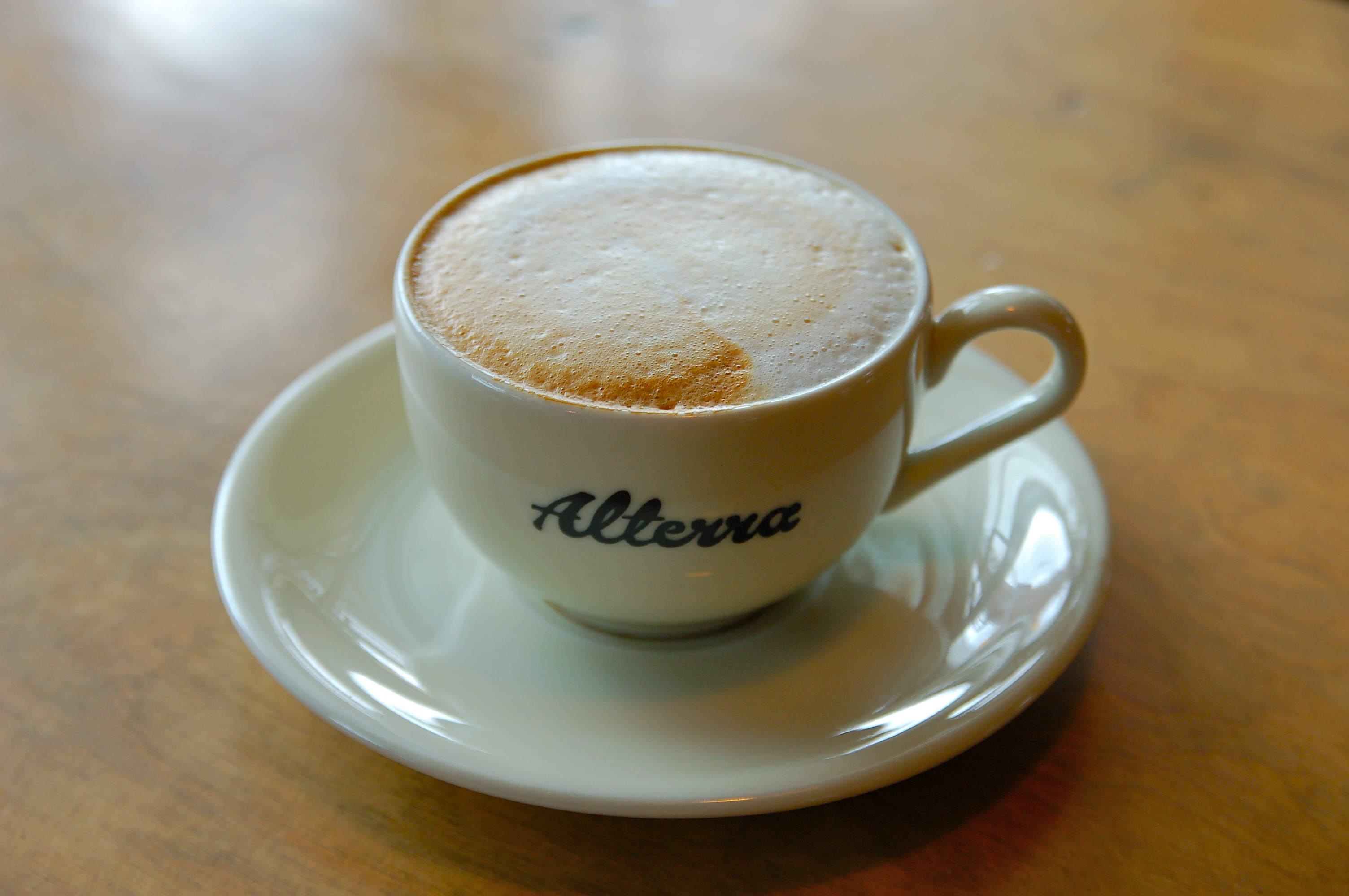 Cappuccino